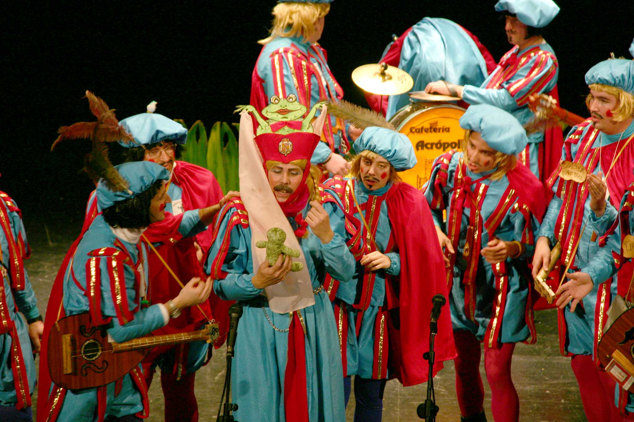 Carnavales en el Teatro Cervantes (Linares 2005)